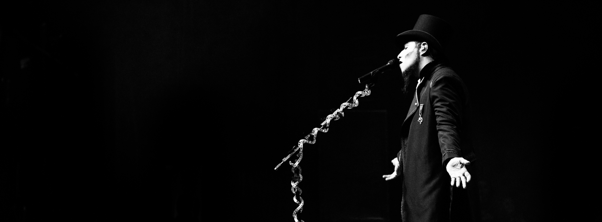 Foto de divulgação